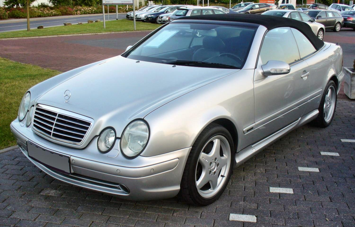 Mercedes-Benz A208